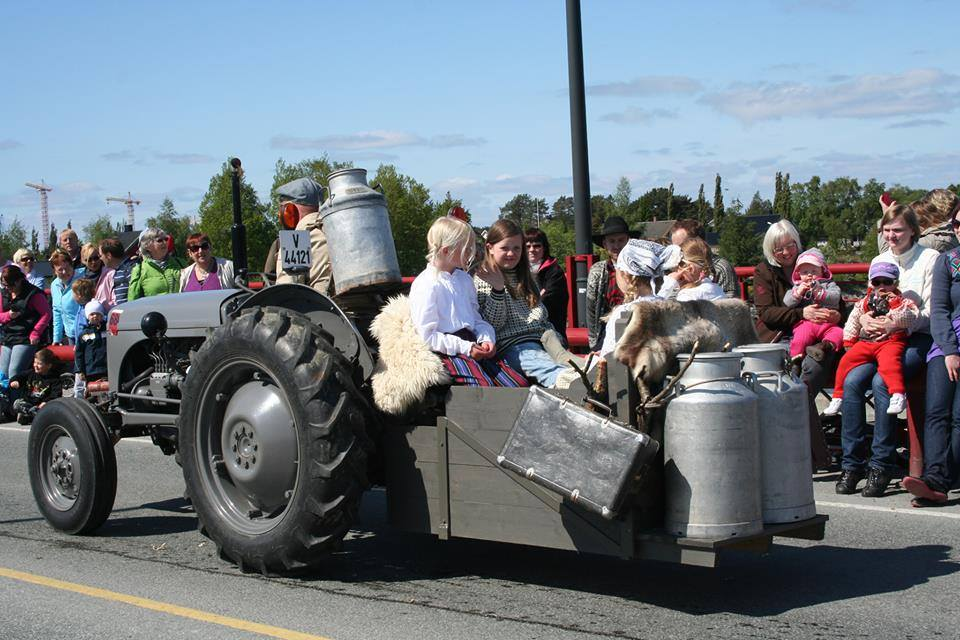 En av de mange traktorene som deltar under vømmølfestivalen i vømmøltoget.